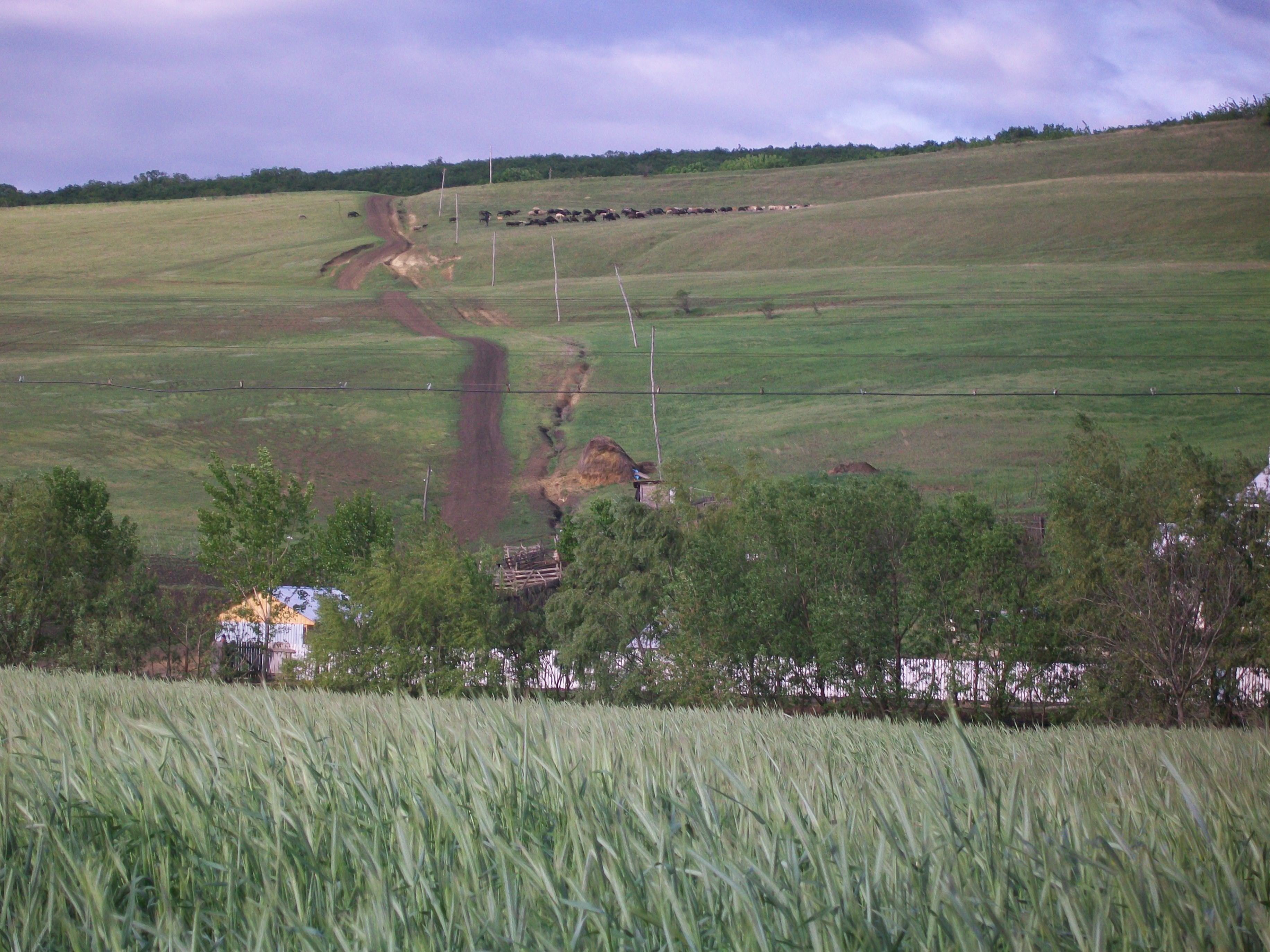 Dealul Bombonica , comuna Ibăneşti ,Vaslui